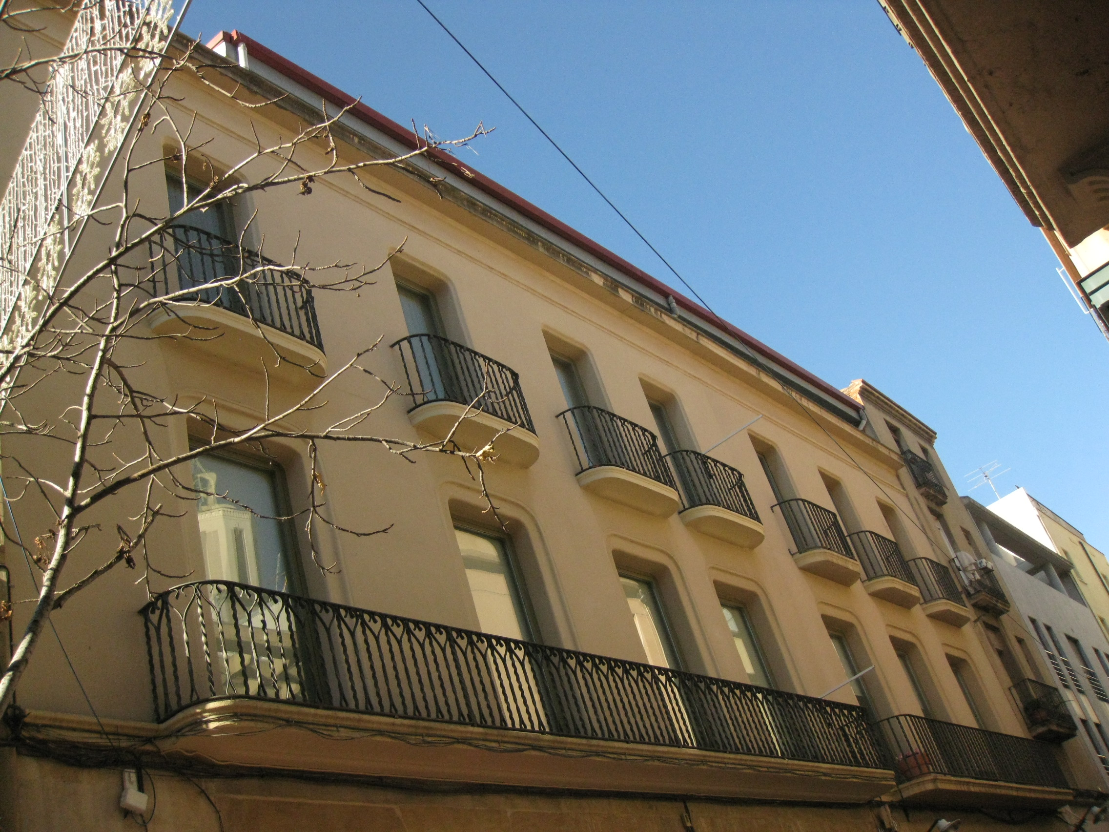 Casa Miquel Mach Oller, obra de Lluís Muncunill de 1913, al carrer de l'Església núm. 14-16 (Terrassa).